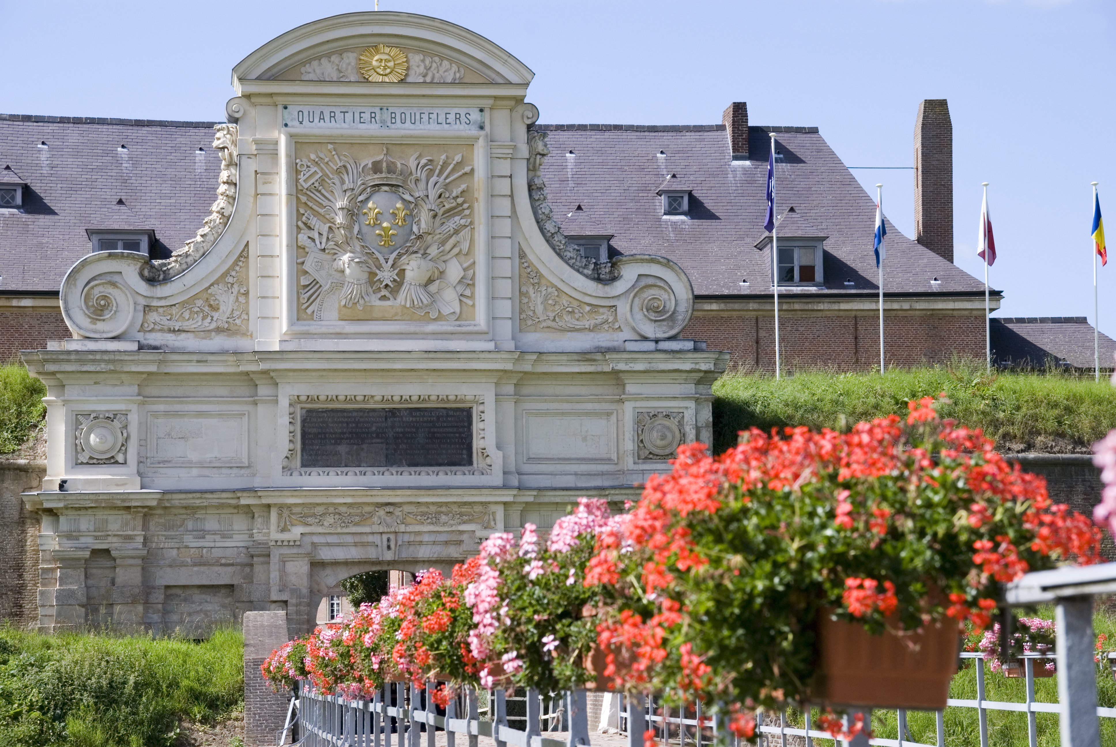 Vue de la porte royale de la Citadelle de Lille.